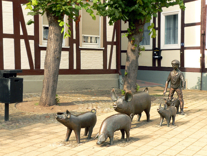 Denkmal im Schweinewinkel in Vorsfelde